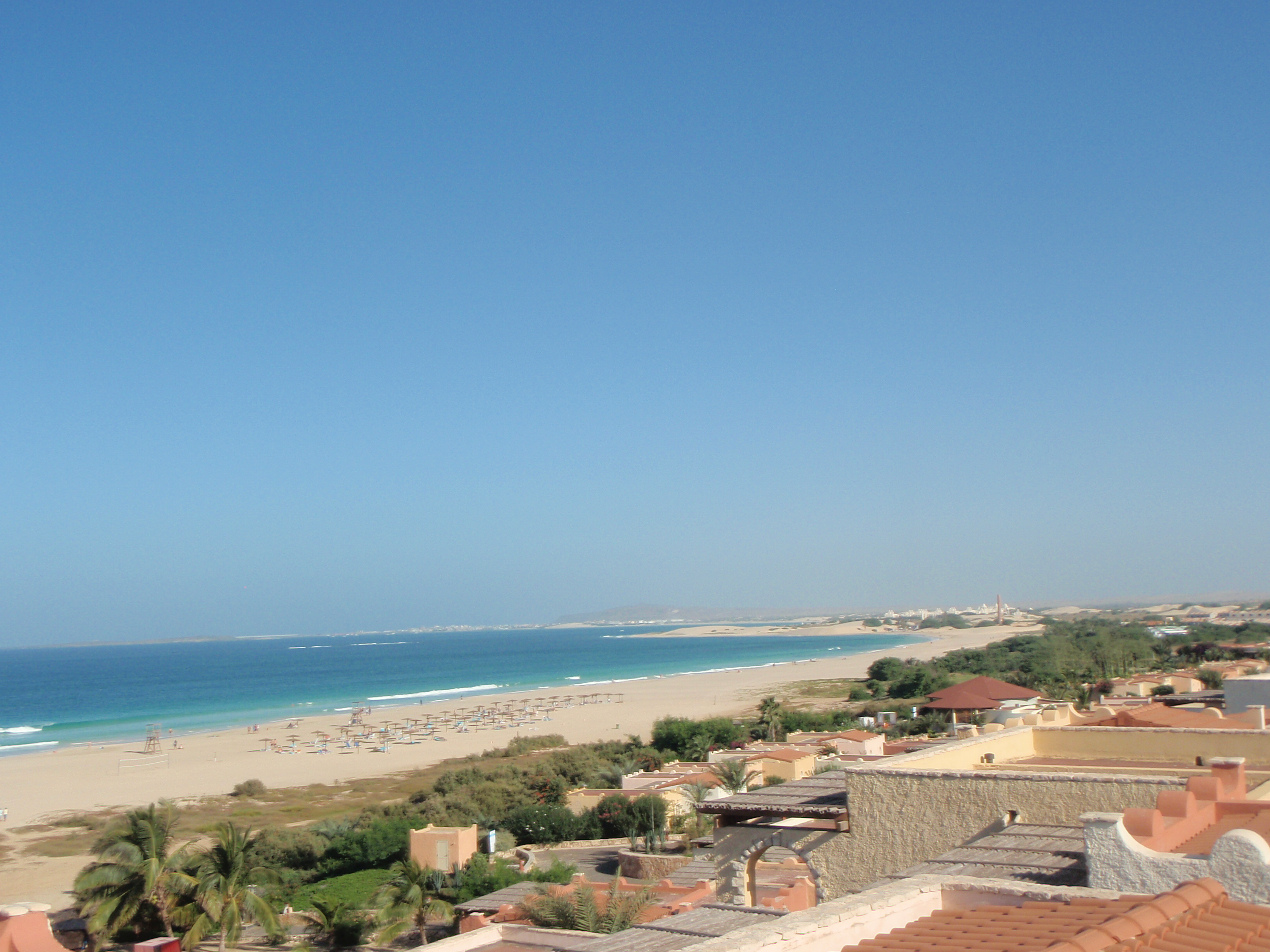 Praia de Chavez, Boa Vista